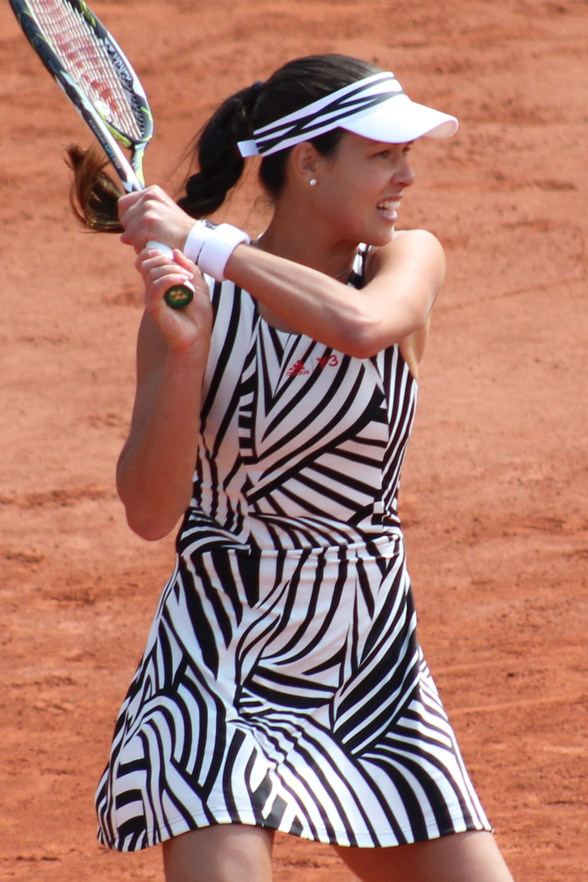 Ivanovic RG16 (32)